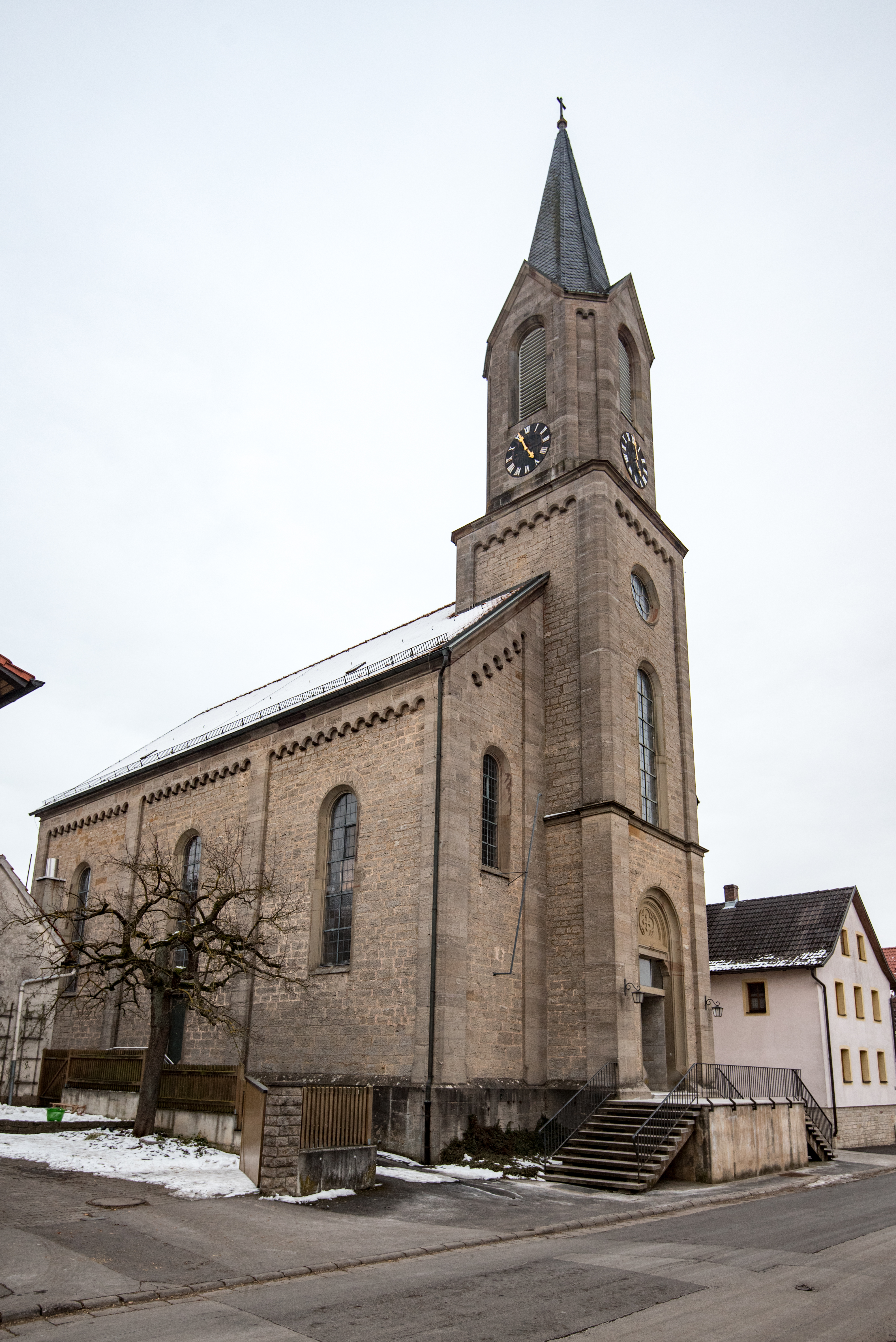 Bastheim, Kirchgasse 5, Kath. Kirche